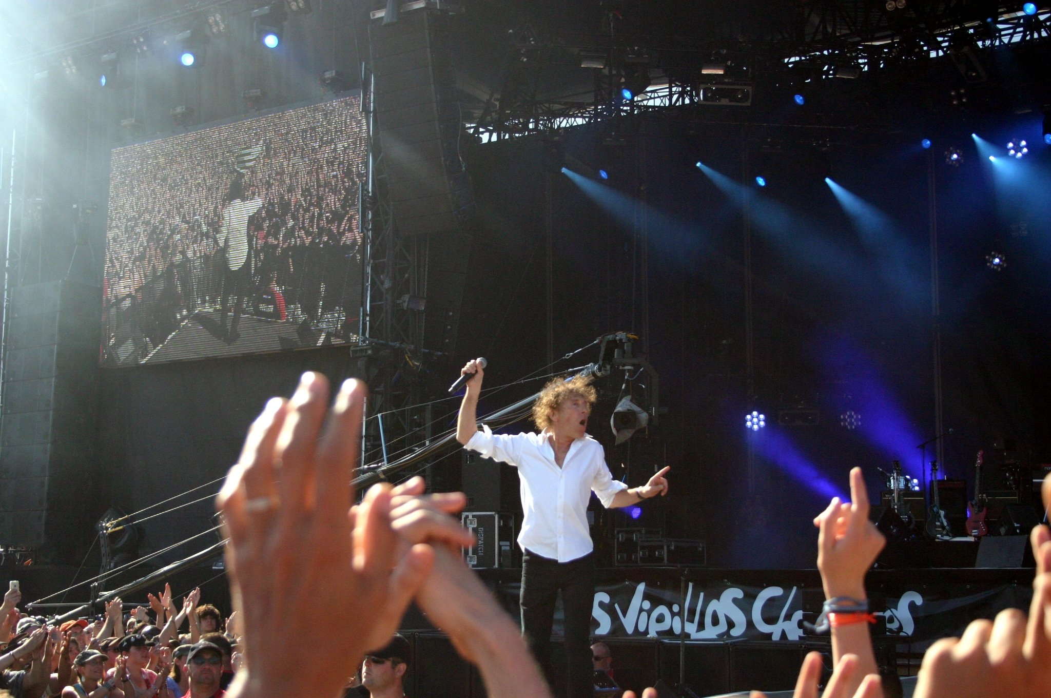 Alain Souchon au festival des Vieilles Charrues 2010 (Finistère, Bretagne, France)